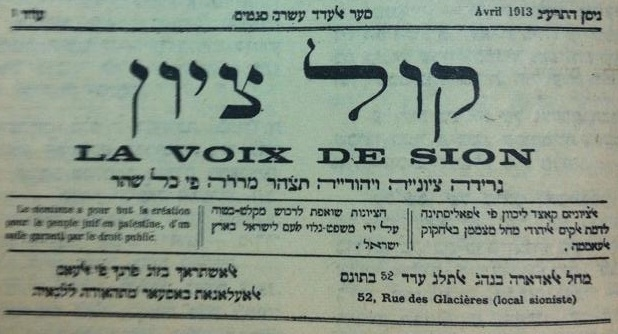 העיתון "קול ציון", עיתון יהודי-תוניסאי ציוני בערבית-יהודית, אפריל 1913 - "Voice of Zion" (Qol Tzion) - A Judeo-Arabic Zionist Newspaper published in Tunisia, 1913.